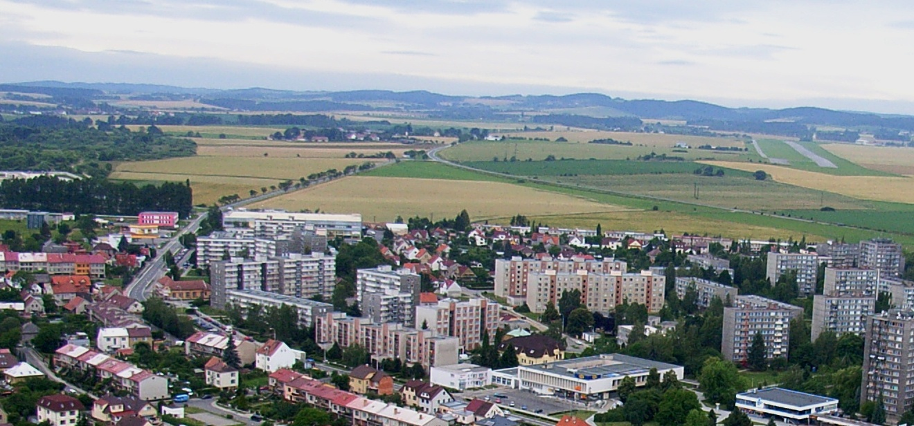 Tábor (Klokoty a Pražské sídliště), Všechov a Zahrádka